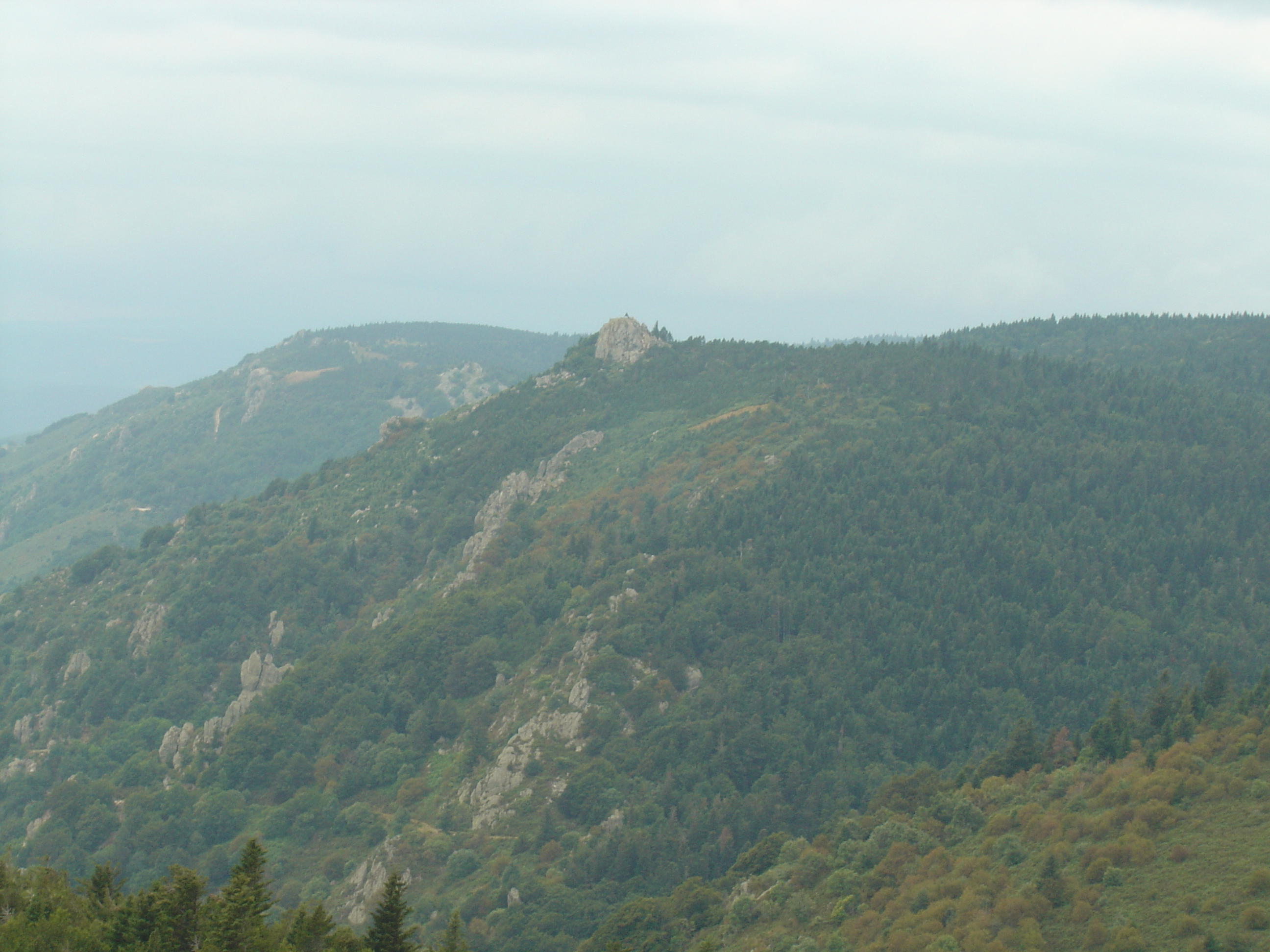 Le Signal de Coucoulude (1448m) vu depuis le sommet Mejan